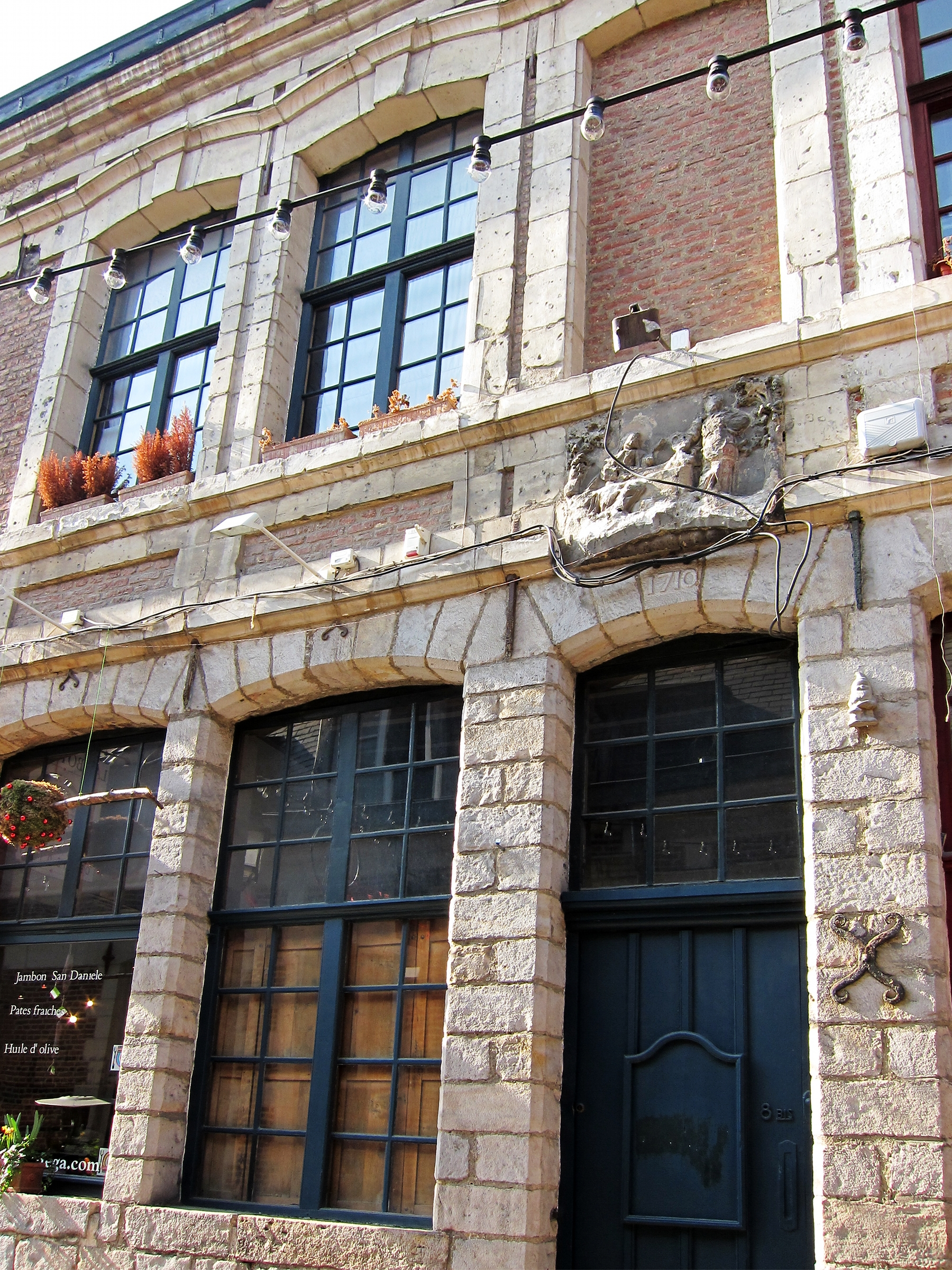 Entrée de l'immeuble 8bis rue au Peterynck à Lille.